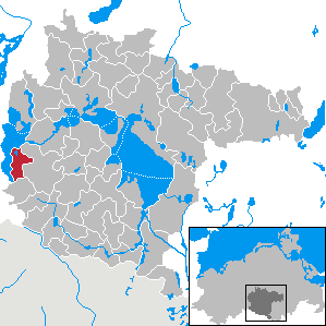 Zislow im Landkreis Müritz, Mecklenburg-Vorpommern